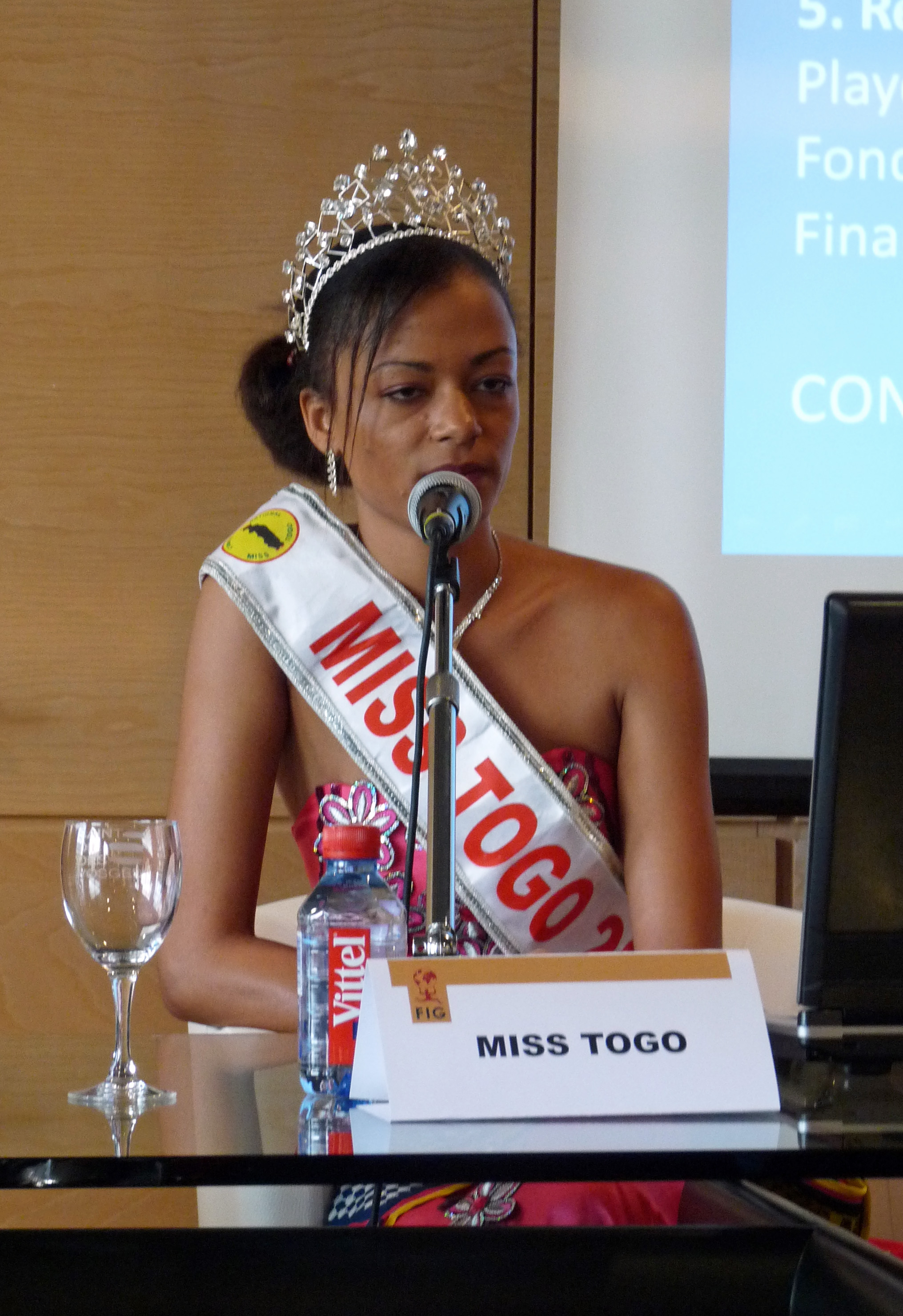 Conférence de Miss Togo 2011 (Monique Quizi Handlos) dans le cadre du Festival international de géographie de Saint-Dié-des-Vosges (Grand Salon de l'Hôtel de ville) sur le thème : "Jeunesse et développement : contribution des Miss aux objectifs du millénaire pour le développement (OMD) par les femmes au Togo".